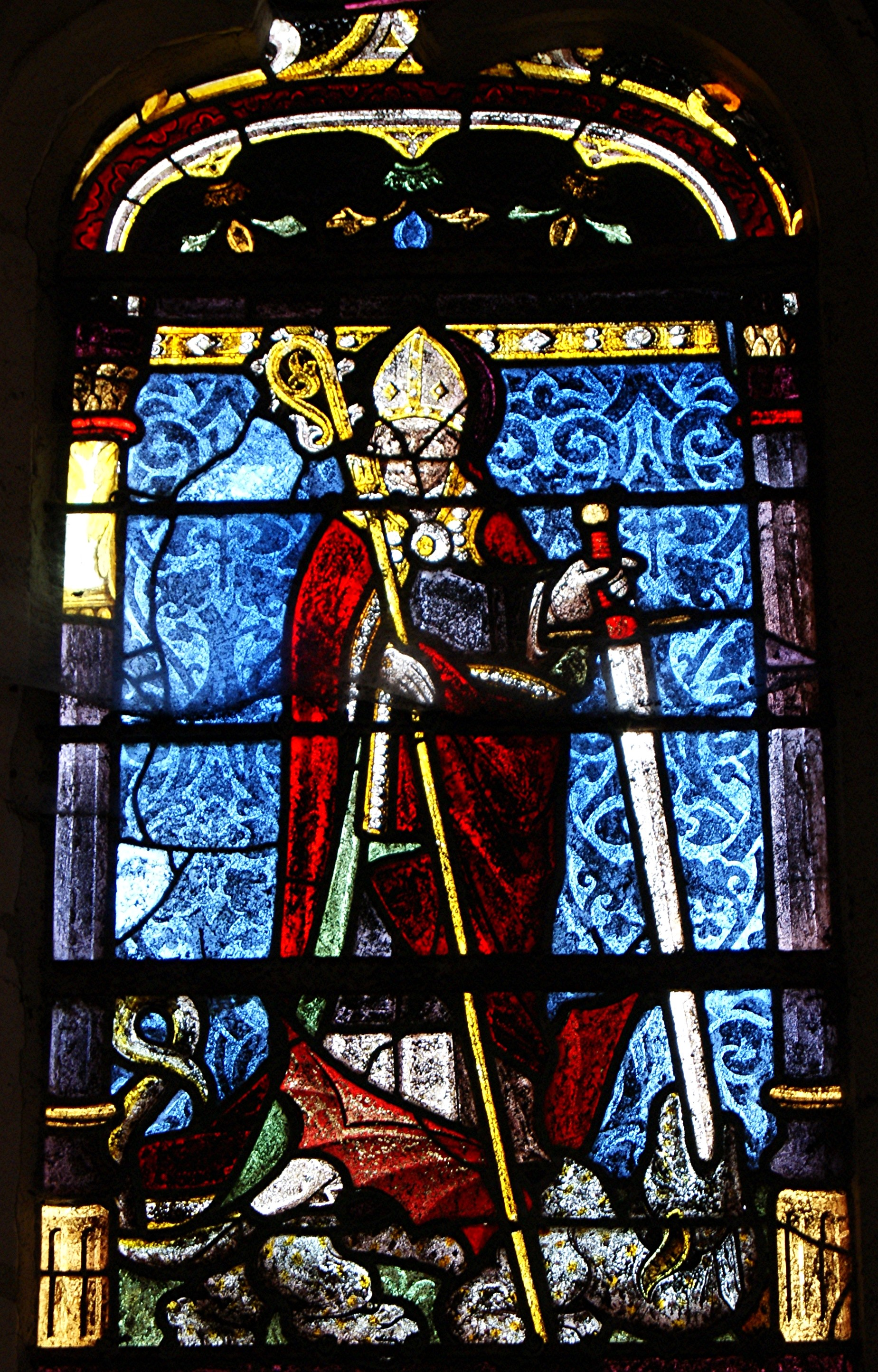 « Saint Loup », vitrail de Nicolas Forjot (baie 1), détail du registre supérieur, v. 1505, peinture sur verre et armature de plomb, 260x140 cm, cœur de l'église Saint-Denis, Torvilliers